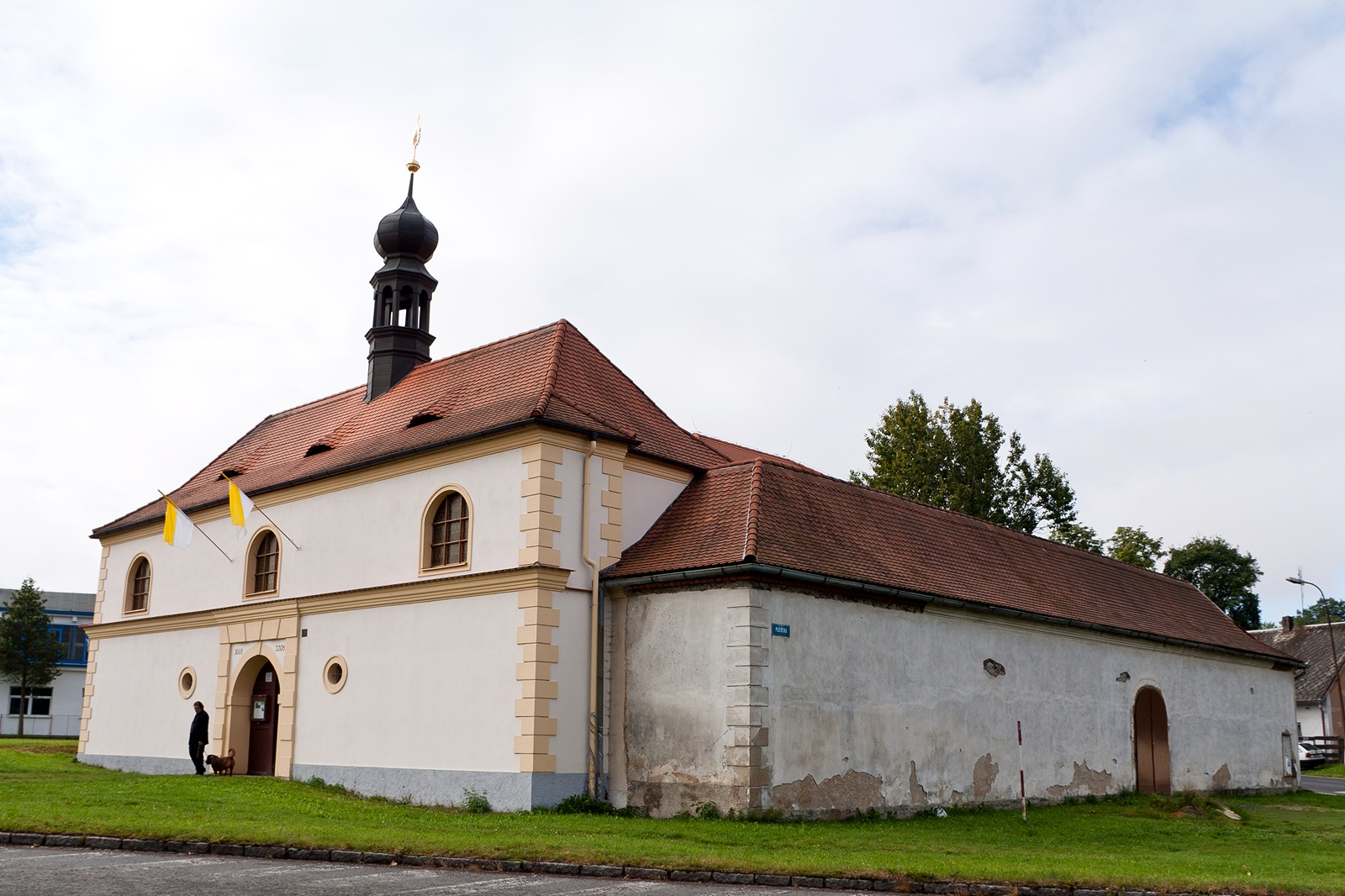 Loreta (Bor), naproti zámku 277, Bor